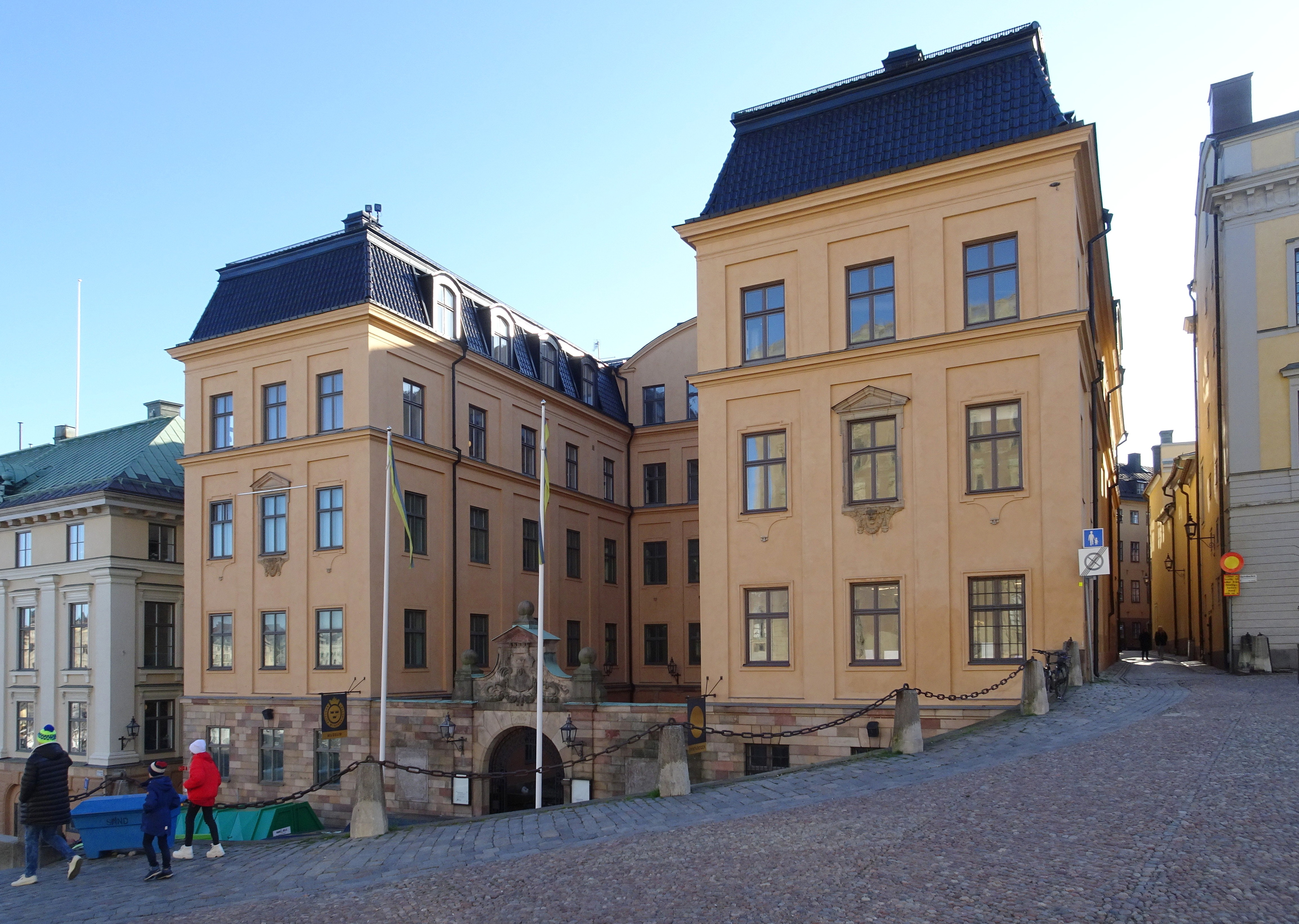 Kungliga Myntkabinettet